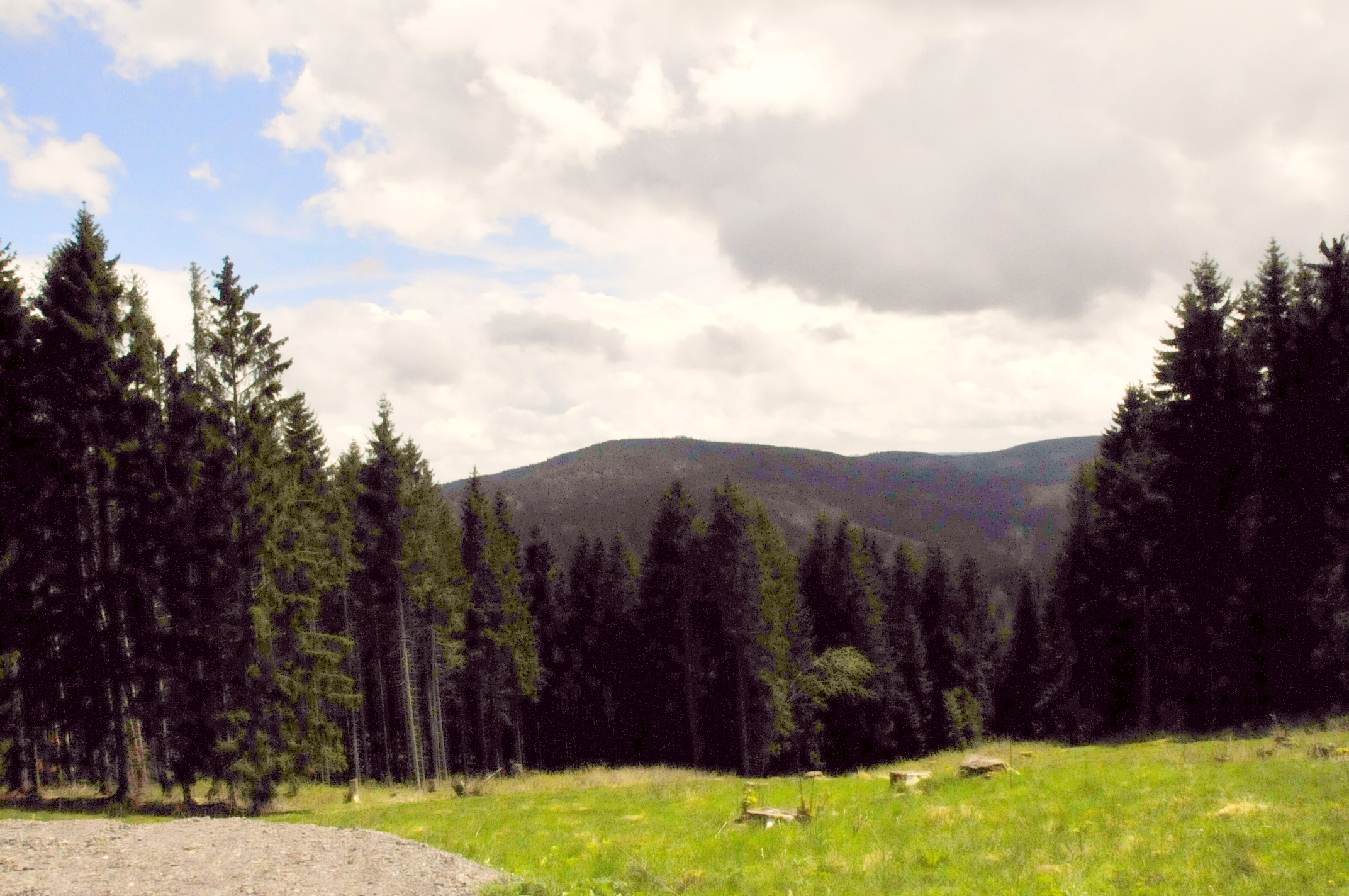 Thüringer Wald, am Wanderweg Mönchhof-Schöffenhaus, im Hintergrund der Kickelhahn